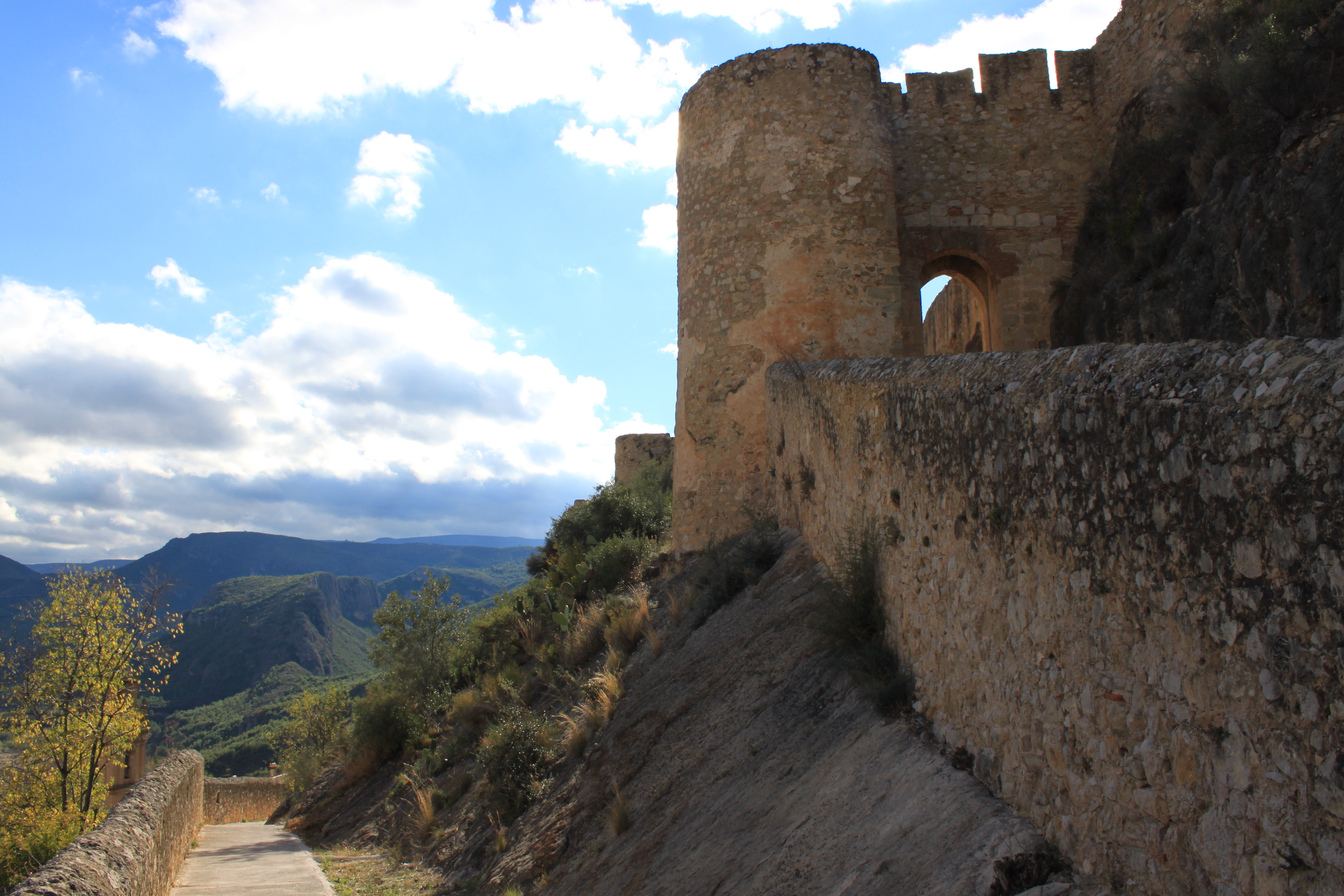 Castillo de Chulilla; Chulilla, Valencia, España.